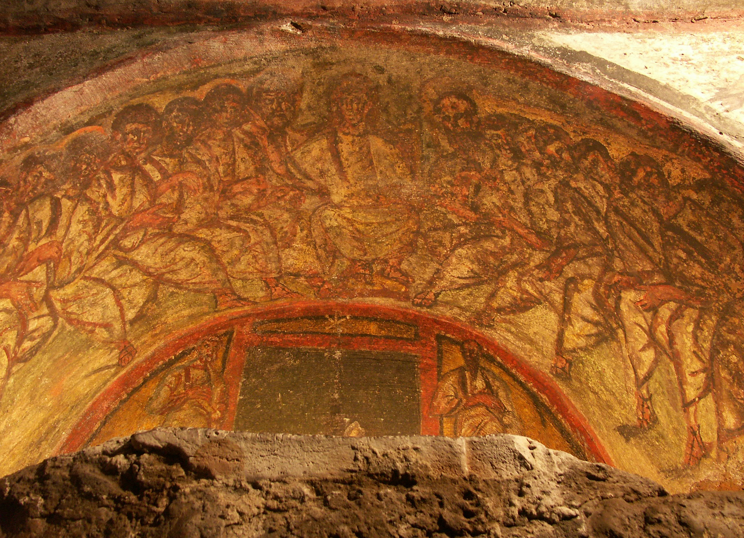 Rom, Domitilla-Katakomben, Fresko "Christus und die 12 Apostel" und Christussymbol "Chi Rho" 1